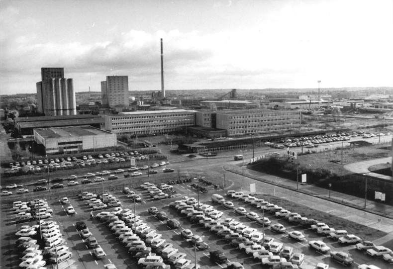 Schwerin, Industriegebiet Süd ADN-ZB Pätzold 20.5.1987 Schwerin: Honecker-Besuch 10 000 Werktätige arbeiten im Industriekomplex Schwerin-Süd. Angesiedelt sind hier das Lederwarenwerk, der VEB Hydraulik, das Plastmaschinenwerk, das Mischfutterwerk, ein Plattenwerk und ein Lehrausbildungskomplex.